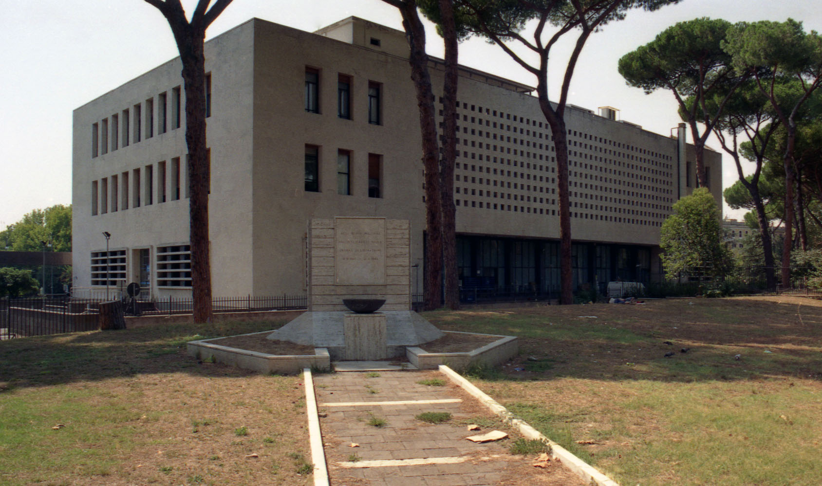 Ufficio Postale a via Marmorata